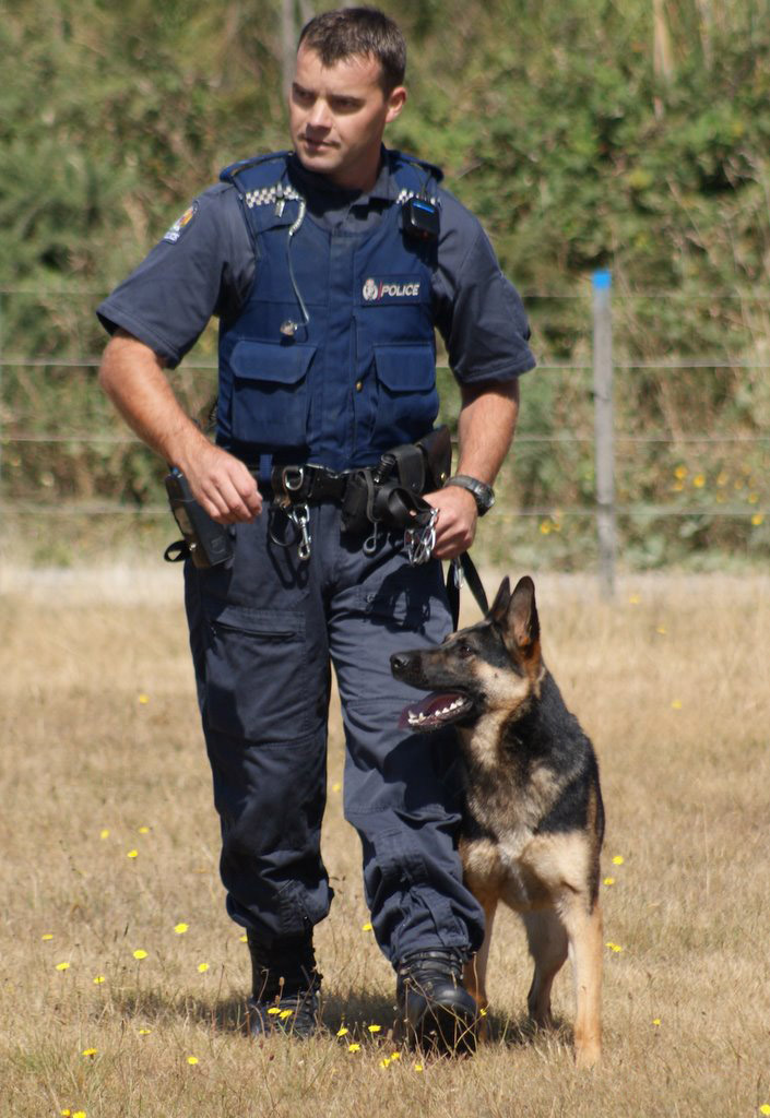 NZ Police Dog